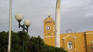 Ubicada En La Plaza Mayor